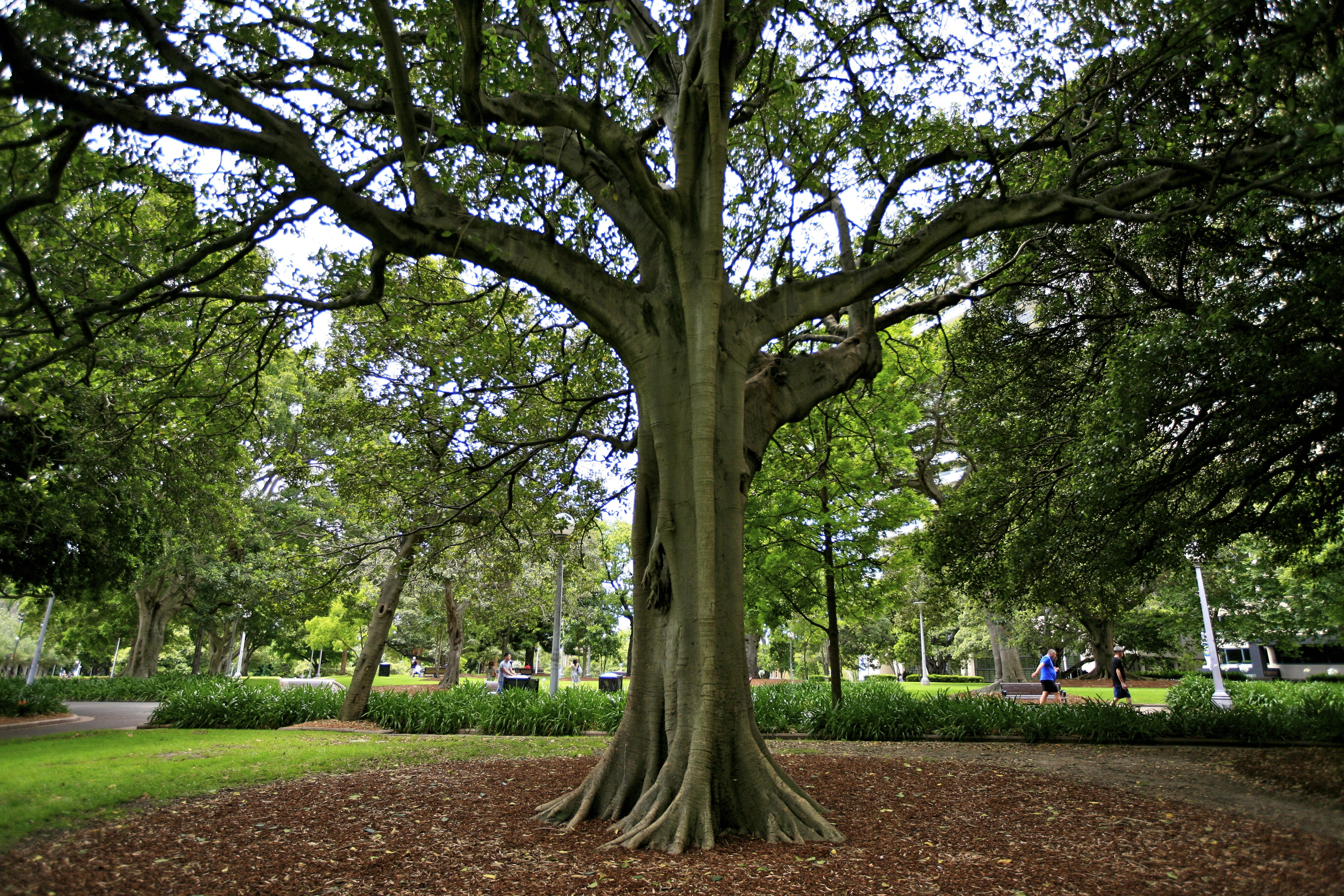 Hyde Park, Moreton Bay fig